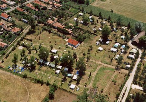 Jászszentandrás, Hungary, aerialphotography